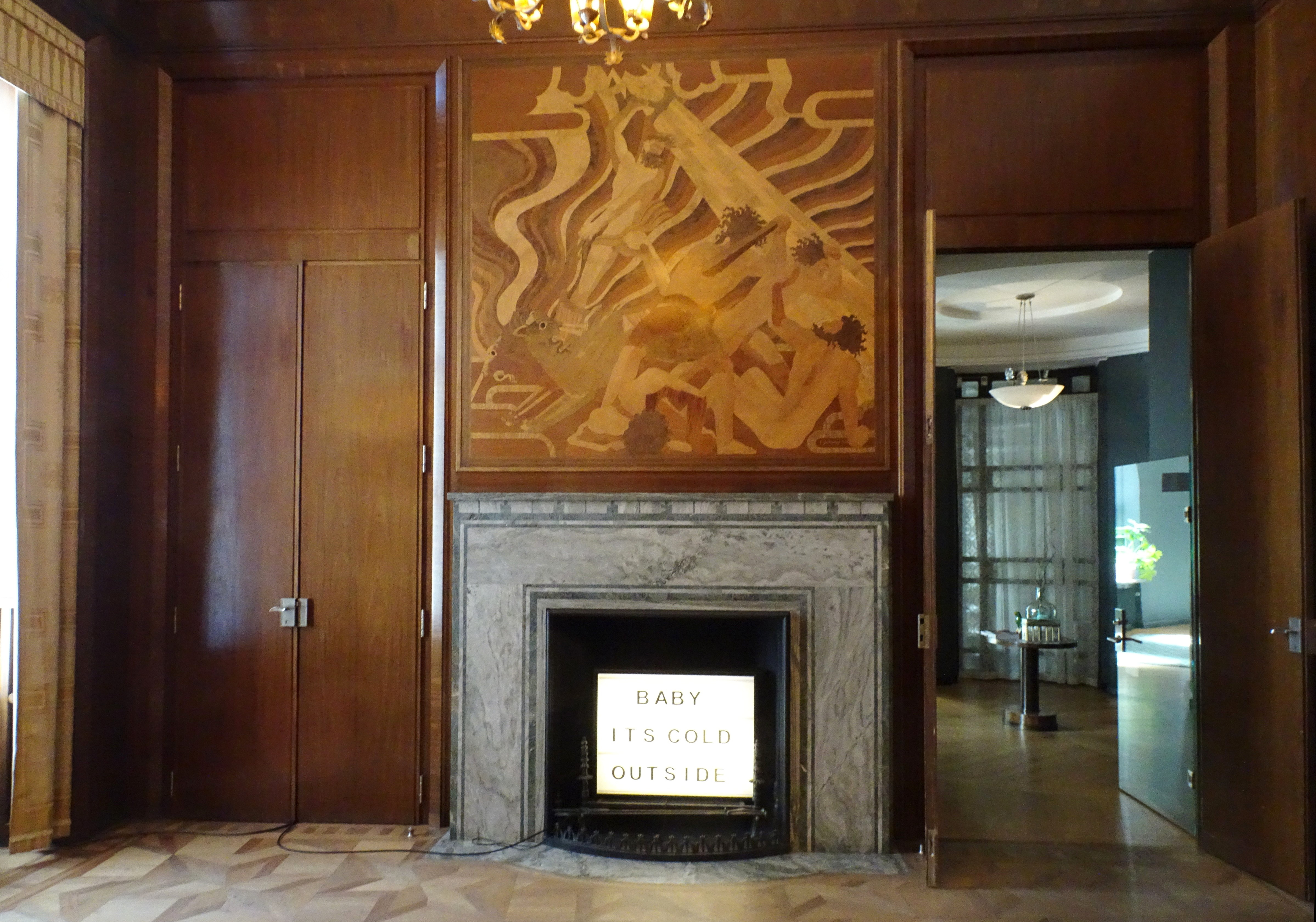 Tändstickspalatset Sessionssal, öppen spis